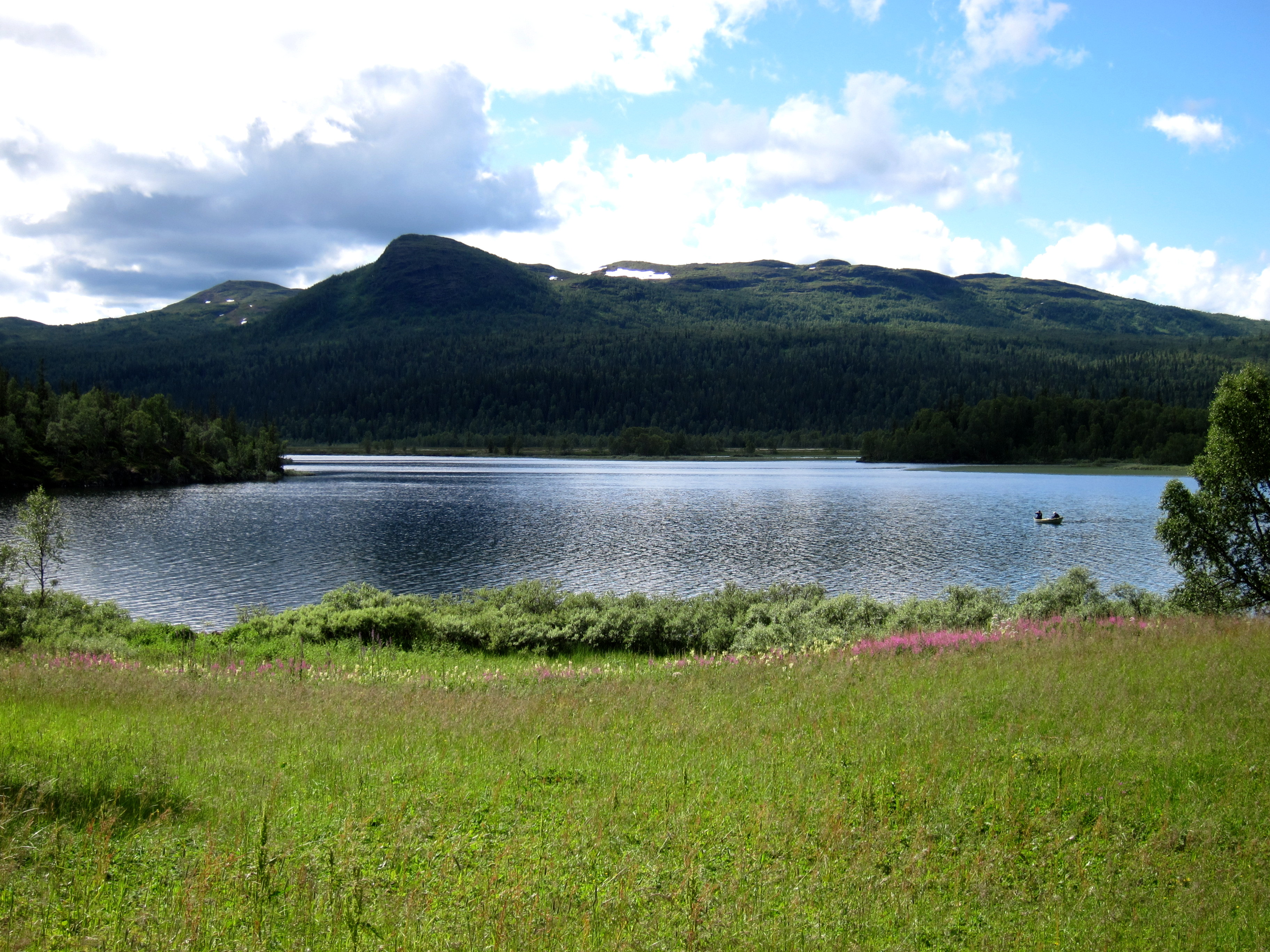 Leipikvattnet